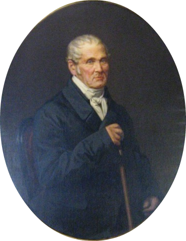 Agustín Nathaniel Miers-Cox Lloyd​ (Grosmont, Monmouthshire, Reino Unido, 24 de mayo de 1785 - Valparaíso, Chile, 06 de febrero de 1869) Doctor en medicina.